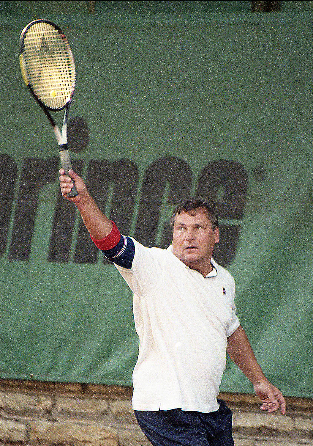 Aleksander Kwaśniewski Poola poliitik, president Tallinnas 26.08.99